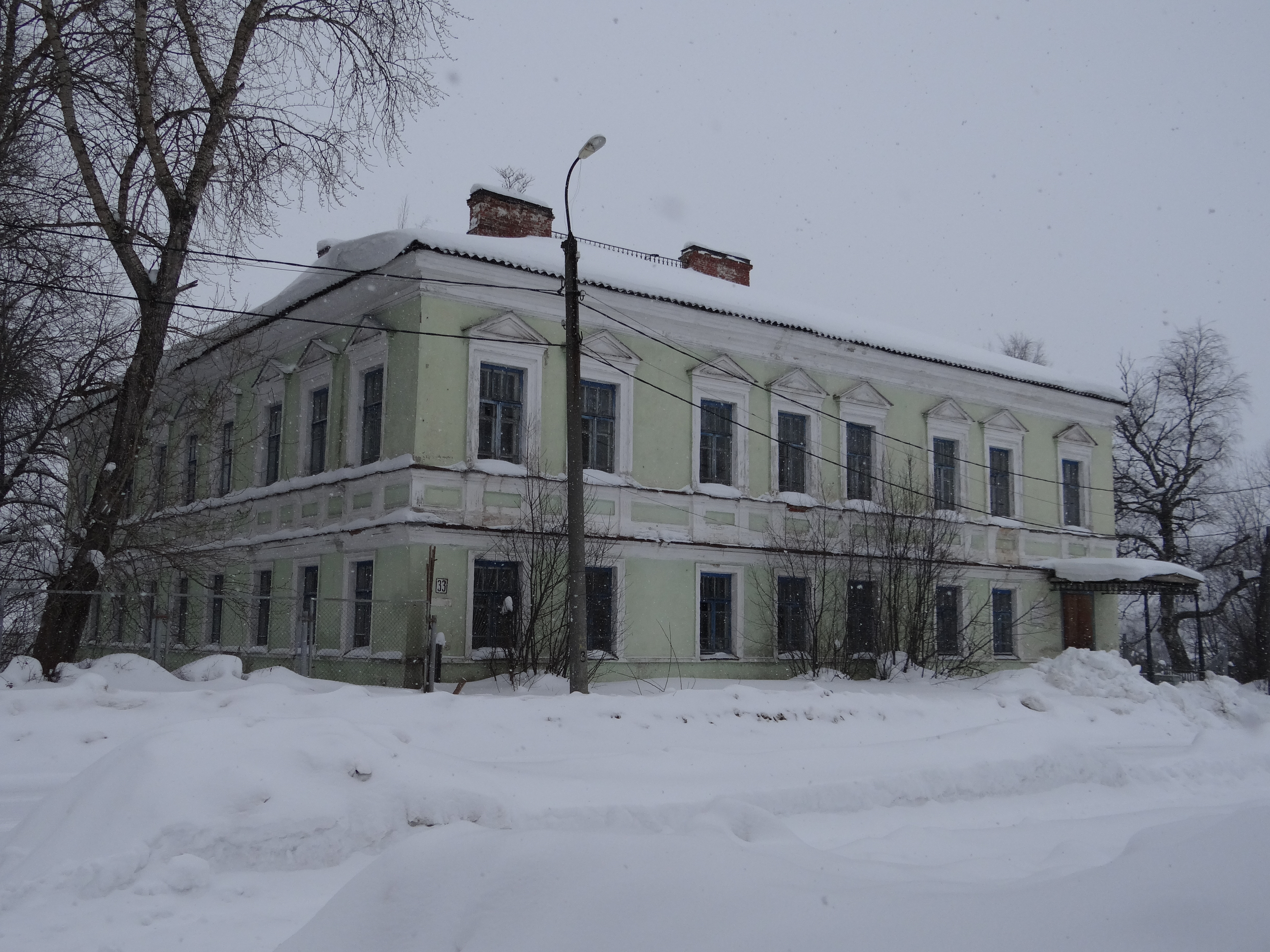 Дом купца Базегского (Республика Карелия, Пудож, улица Ленина, 33)